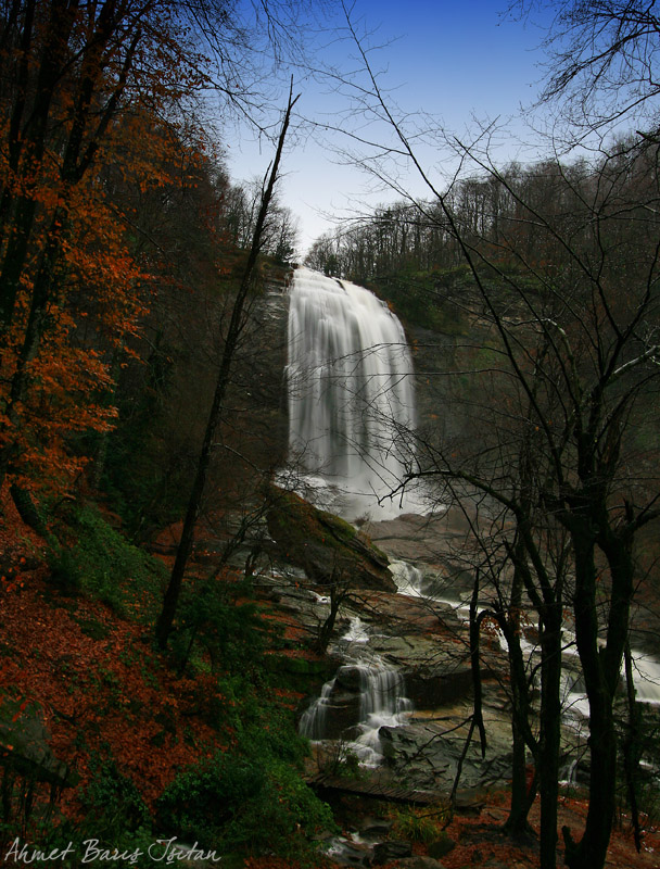 Bursa'nın Mustafakemalpaşa İlçesi'ndeki Suuçtu Şelalesi. 38 metreden dökülür.